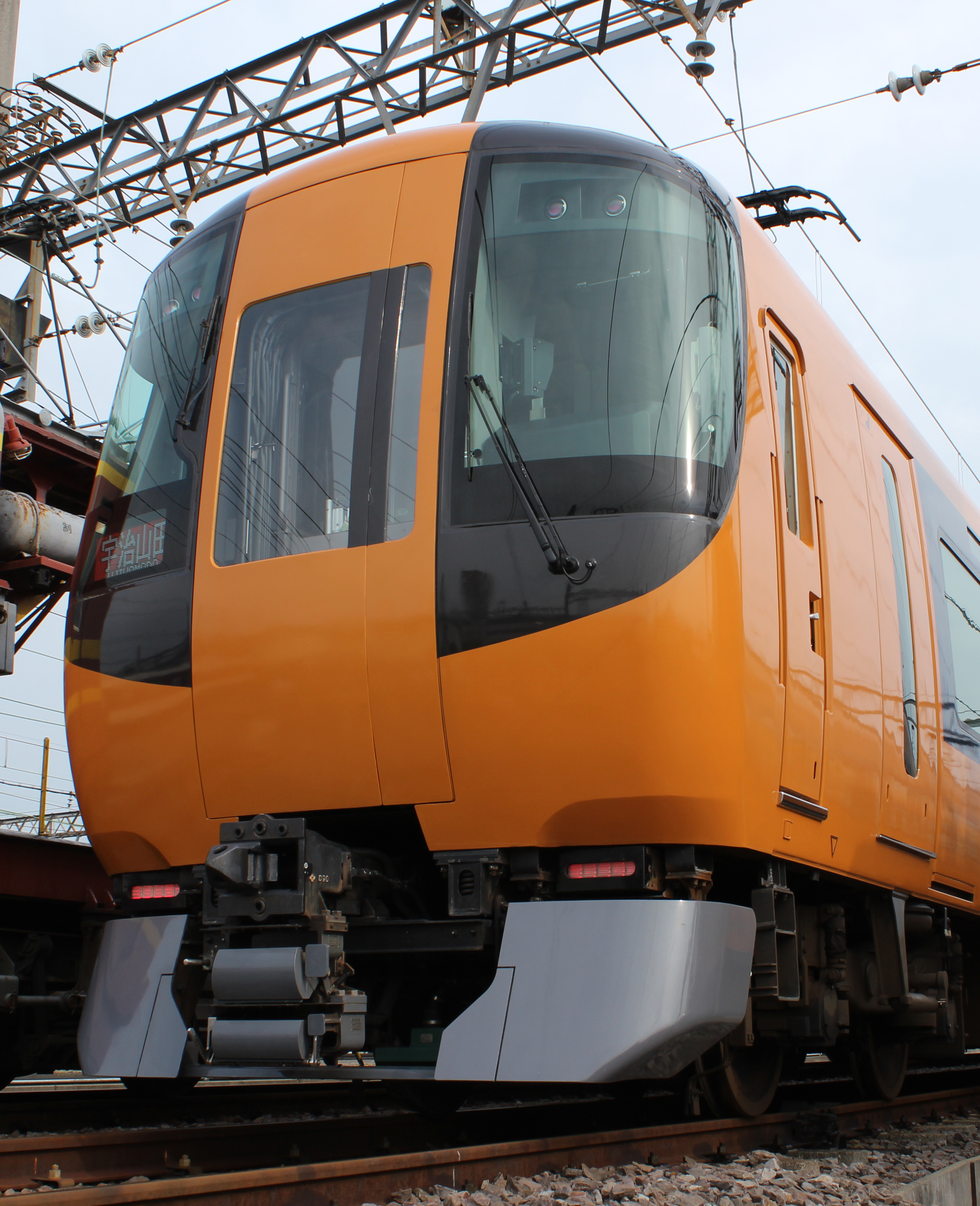 近鉄22600系（五位堂にて）